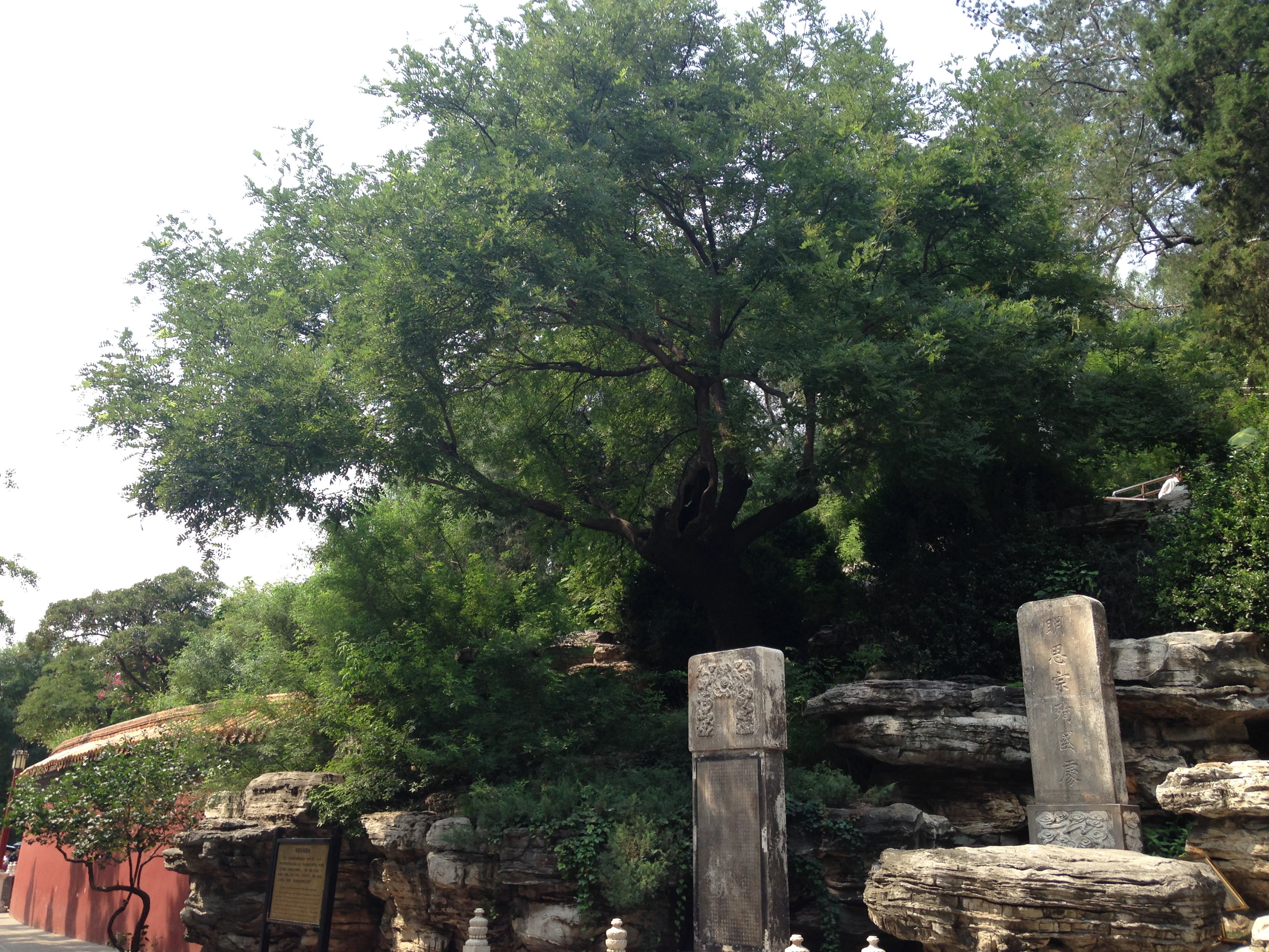 景山公園のエンジュ